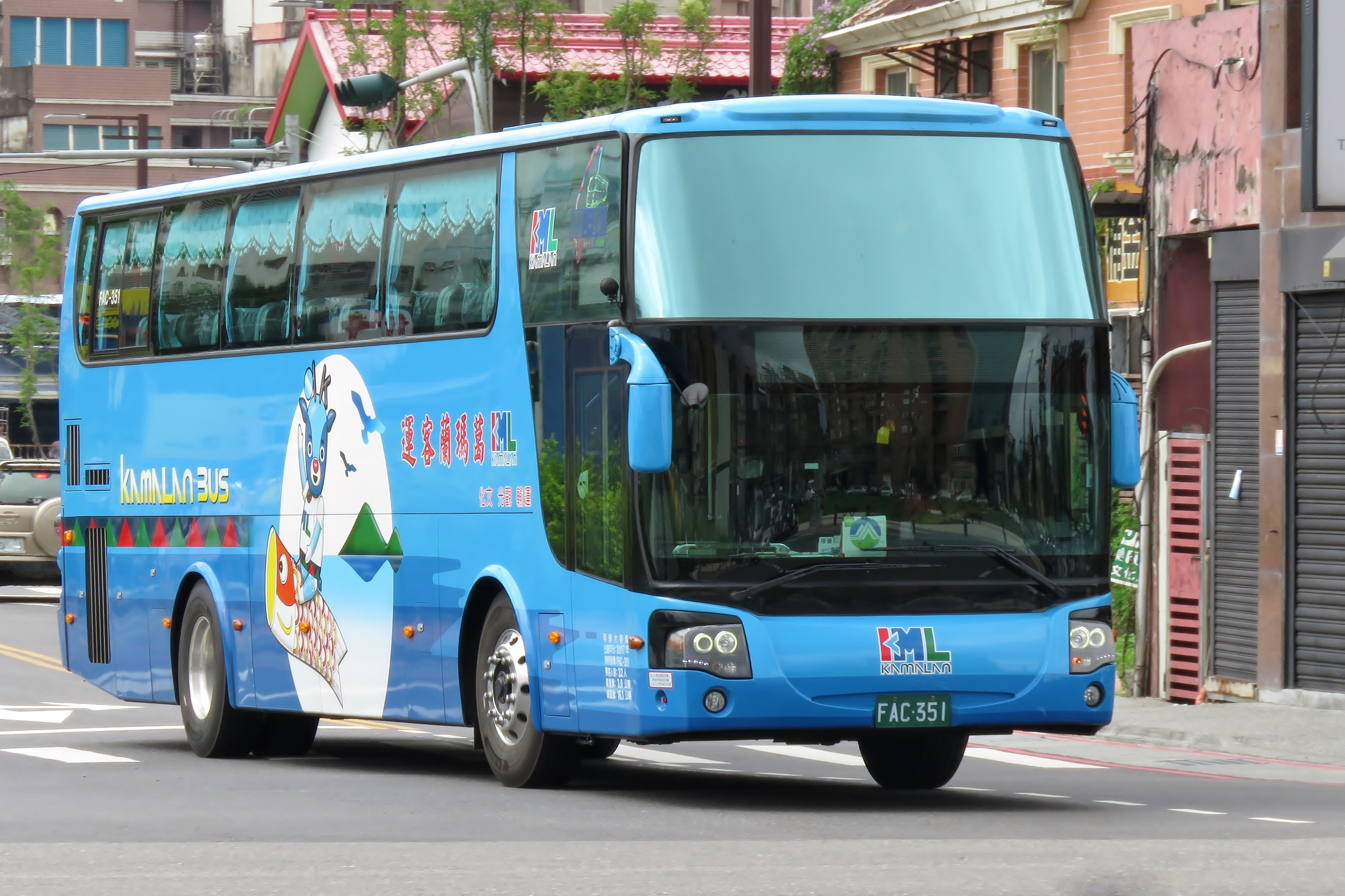 中文（台灣）: 葛瑪蘭客運2017 MITSUBISHI FUSO RM11FN2XC FAC-351 暫停服務